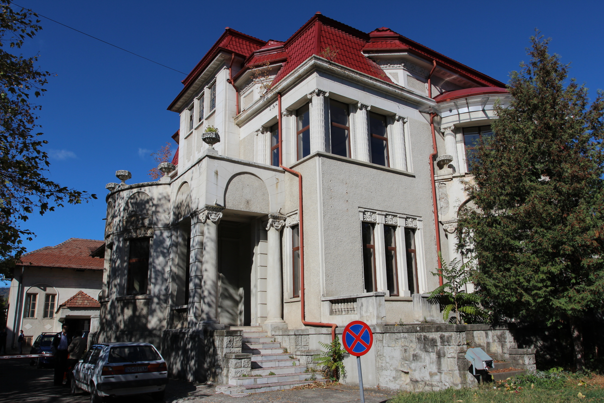 Tribunal județean, azi casă